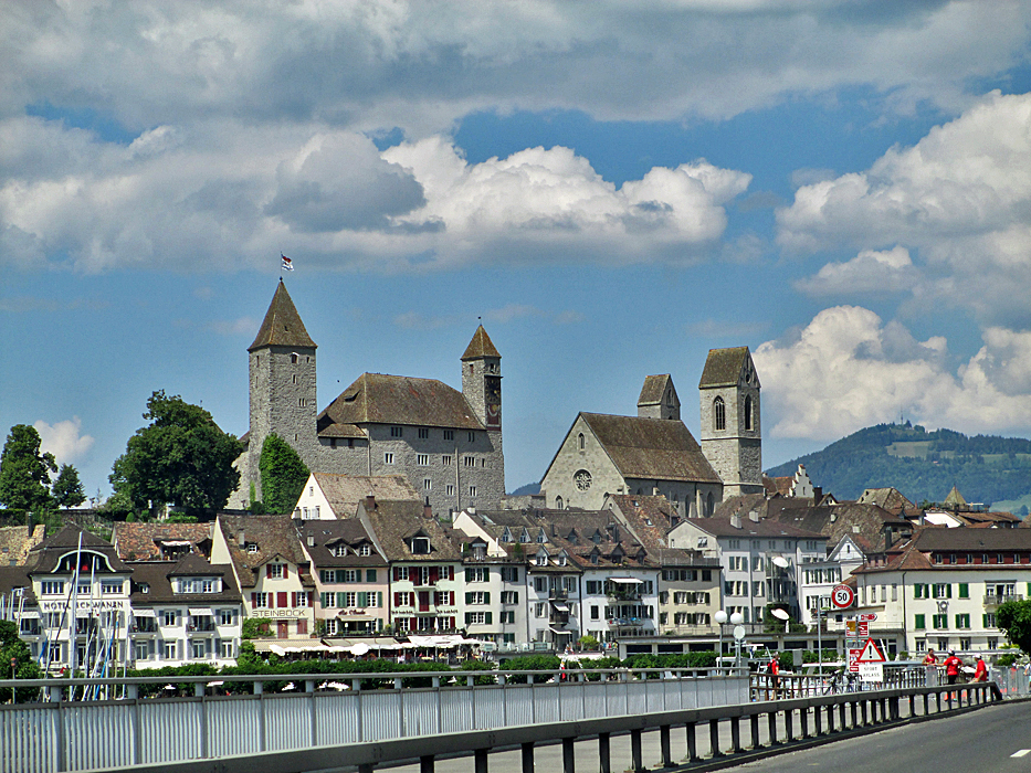 Rapperswil, Ansicht vom See